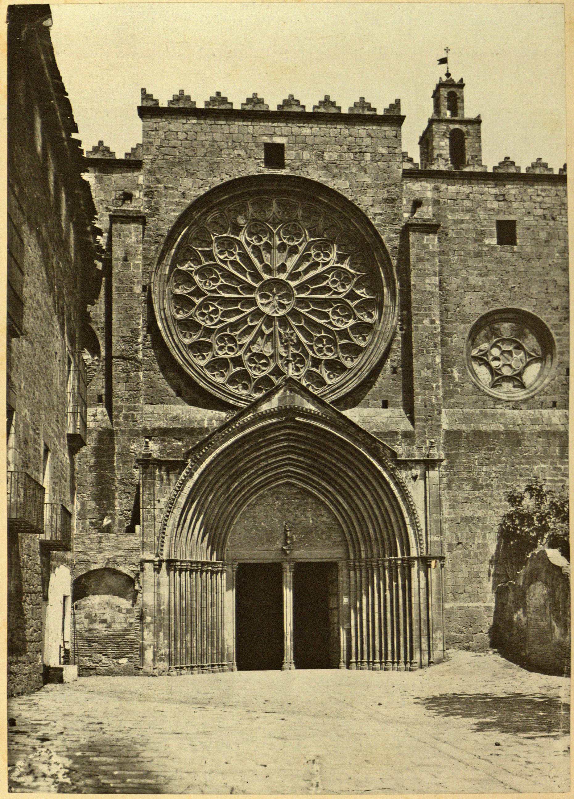 'Façana del monestir de Sant Cugat del Vallès', fotografia d'Heribert Mariezcurrena (~1878). Estampa núm. 8, acompanyada de text explicatiu, a l'Album Pintoresch-Monumental de Catalunya: aplech de vistas dels més notables monuments i paisatjes d'aquesta terra acompanyadas de descripcions y noticias históricas y de guias pera que sían fácilment visitats, publicat per l'Associació Catalanista d'Excursions Científiques el 1878. De disposició lliure al dipòsit digital de documents de la UAB.